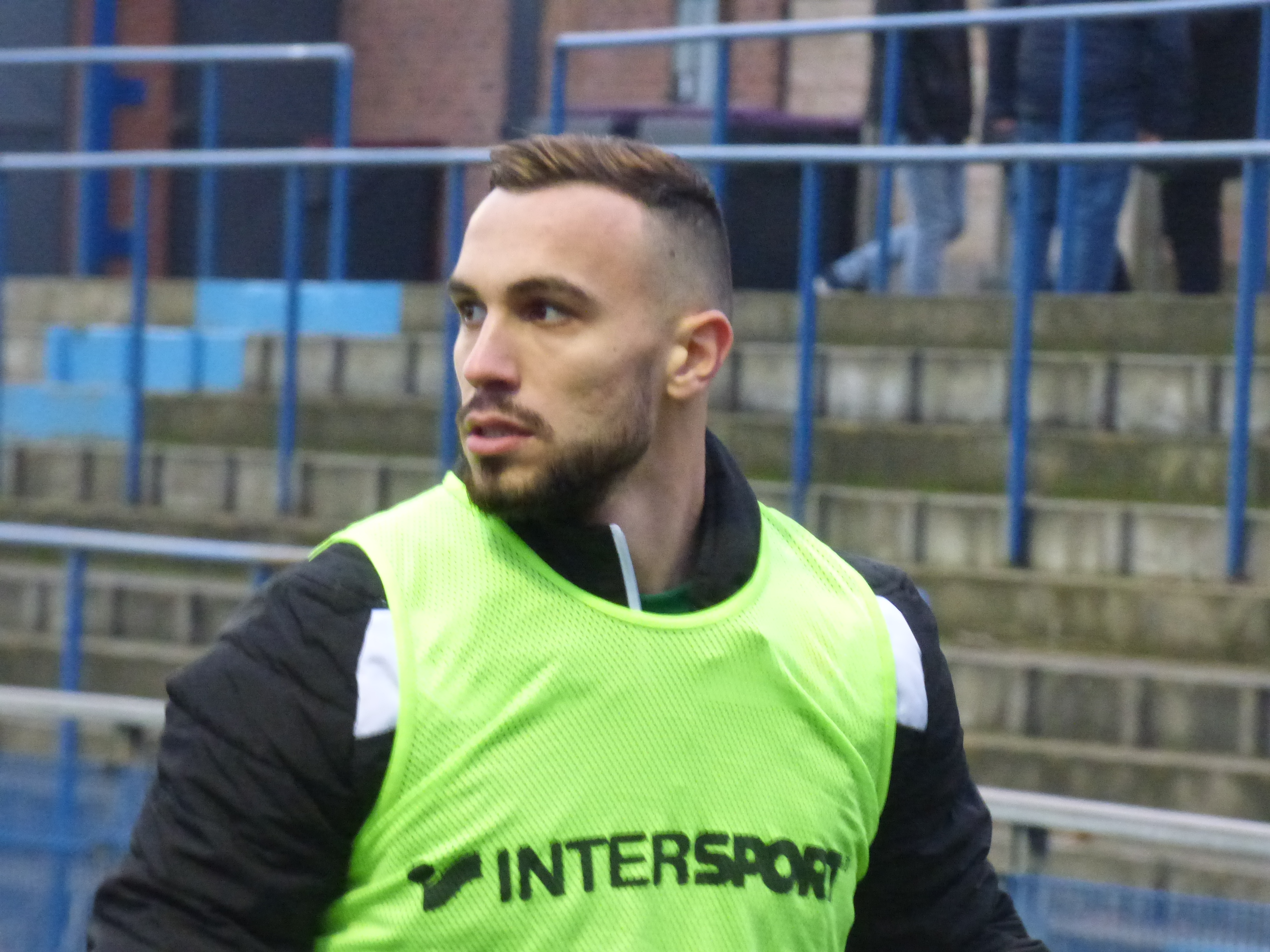 Jérémy Grain lors du match Lens B / Sedan, comptant pour la quatorzième journée du Championnat de France de football de National 2 (4ème division française) 2017-2018 au Stade François-Blin d'Avion le 27 janvier 2018.